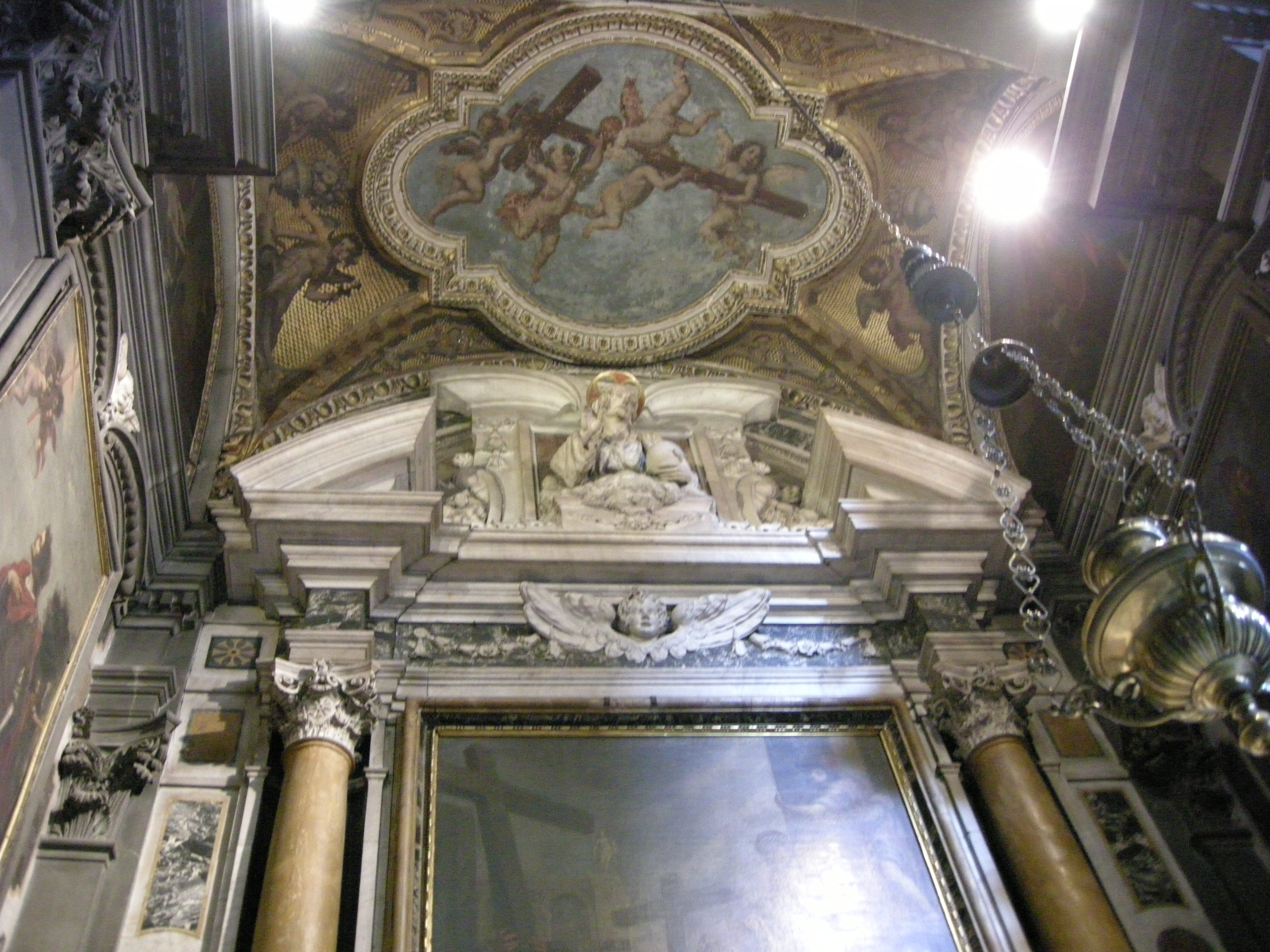 San gaetano, transetto sx, cappella bonsi della croce, volo d'angeli di jacopo vignali e busto di Sebastiano Pettirossi